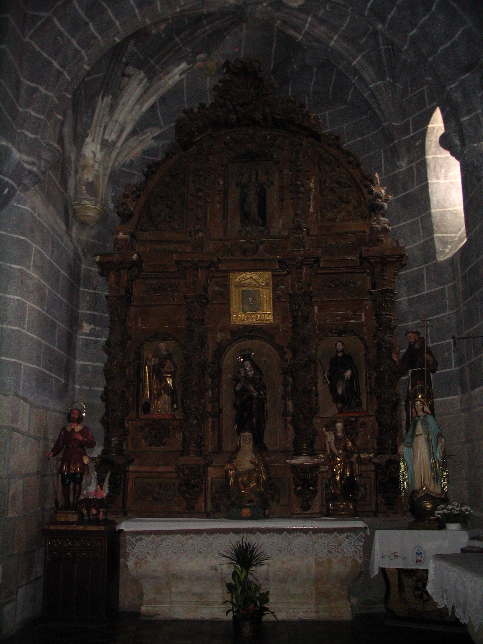 Retablo de Ntra Sra del Rosario, antes de su restauración en el año 2006. Iglesia Ntra Sra del Castillo. Macotera. A la izquierda, San Isidro. A la derecha, San Francisco y la Virgen Milagrosa (actualmente en la capilla del Hospital).